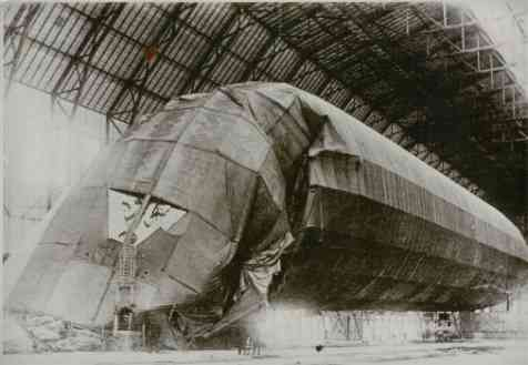 L 22 itu i Toska-hallen i Tønder